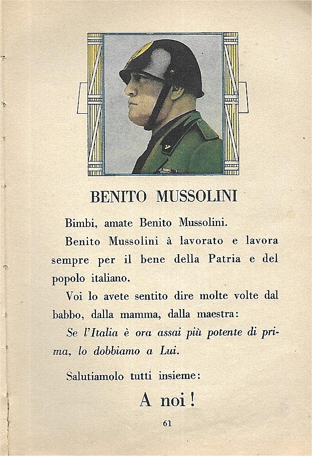 Il libro della prima classe - Benito Mussolini - pag.61